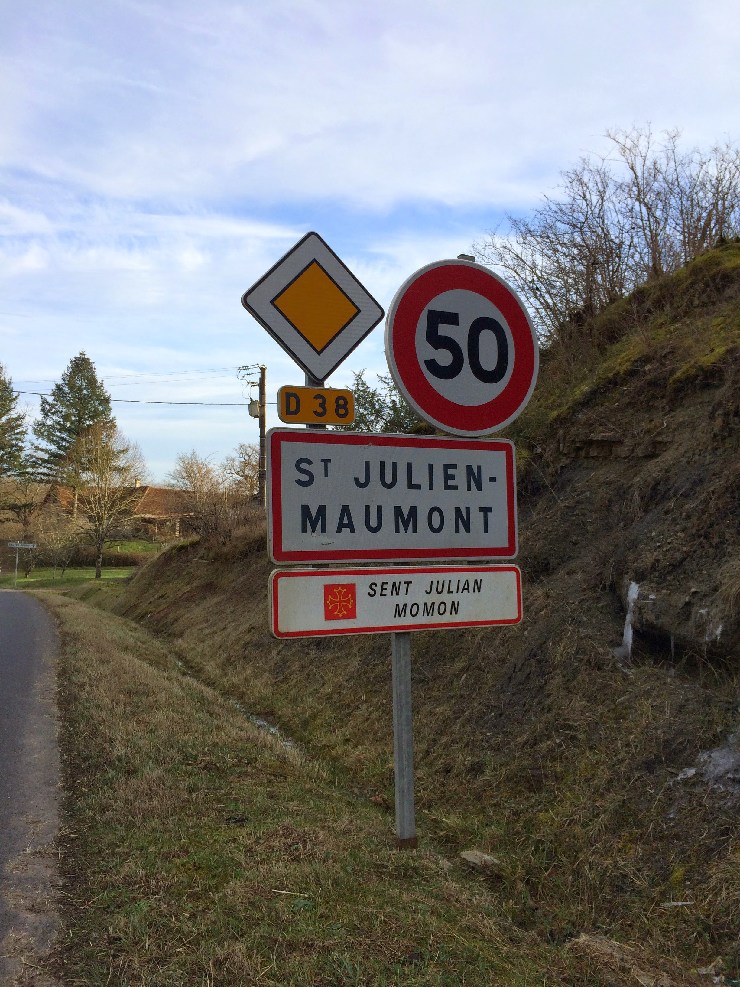 Panèl d'intrada de Sent Julian Momon.